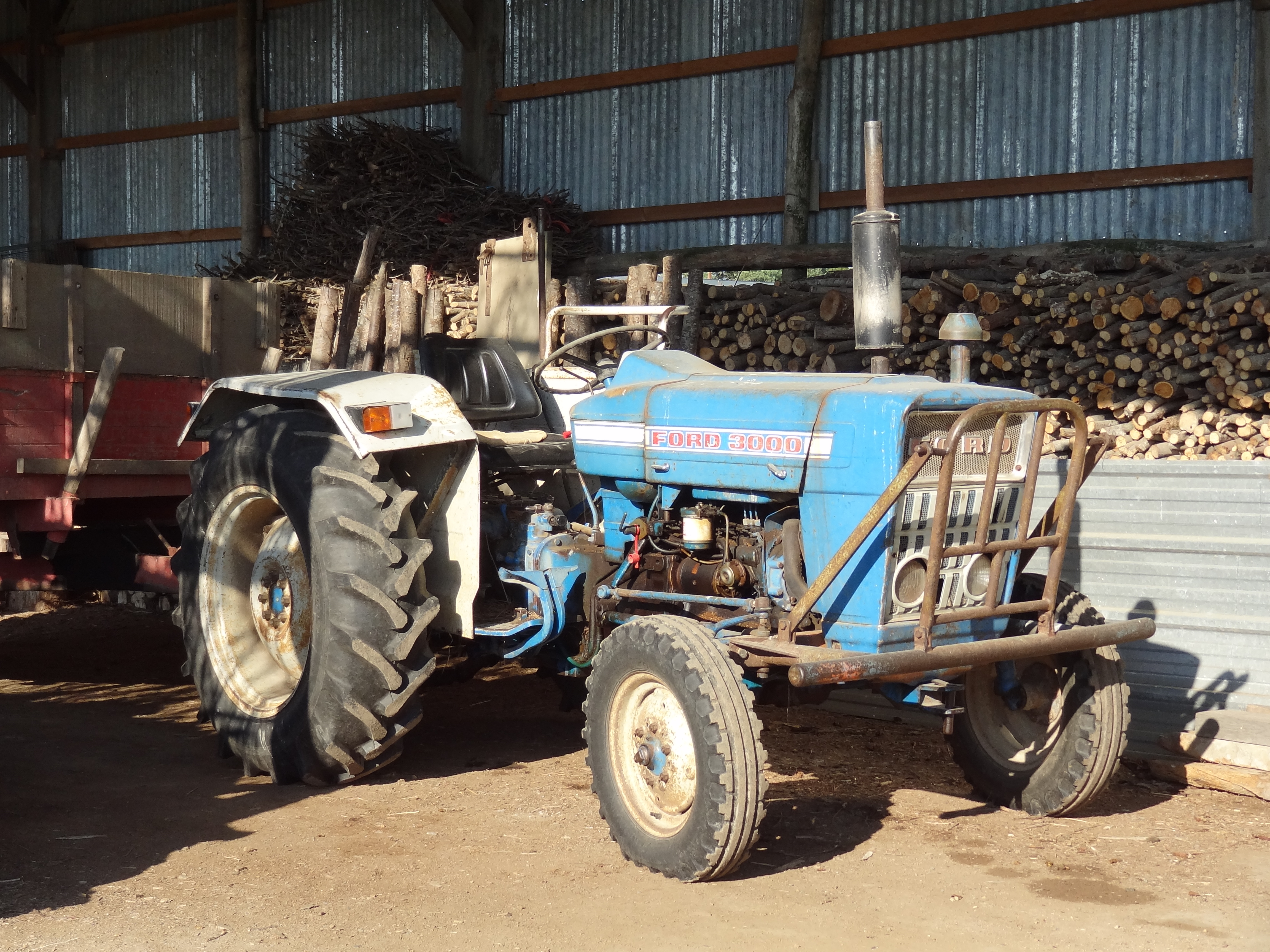 Château de Princé